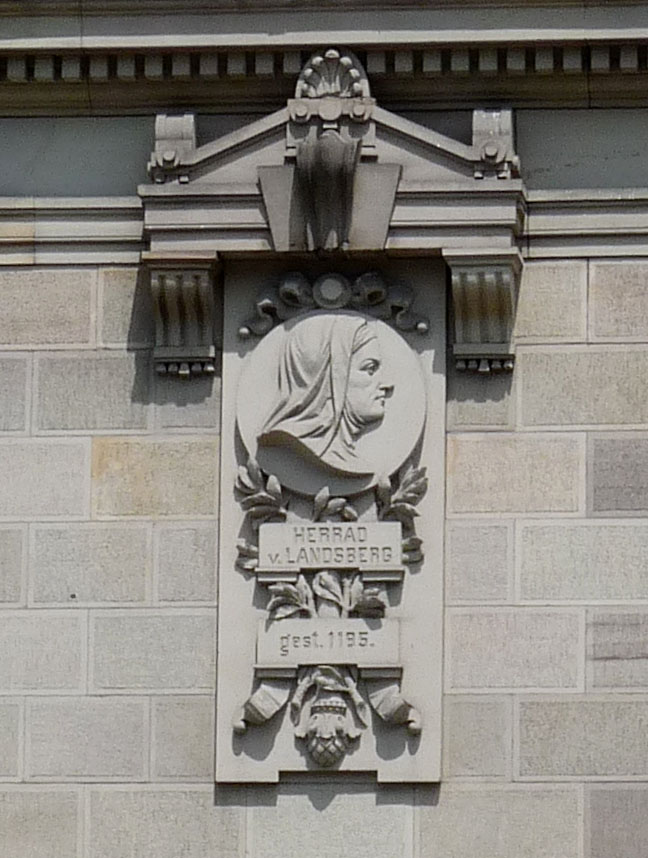 Effigie de Herrad von Landsberg (Bibliothèque nationale universitaire de Strasbourg)